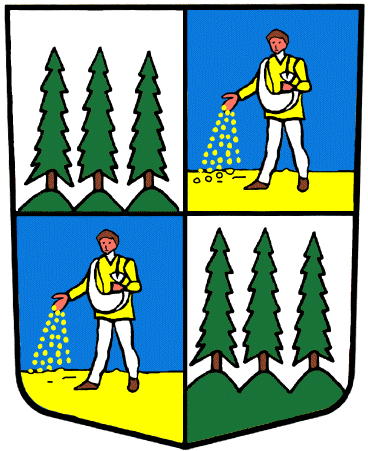 Wappen von Champery Kanton Wallis SCHWEIZ